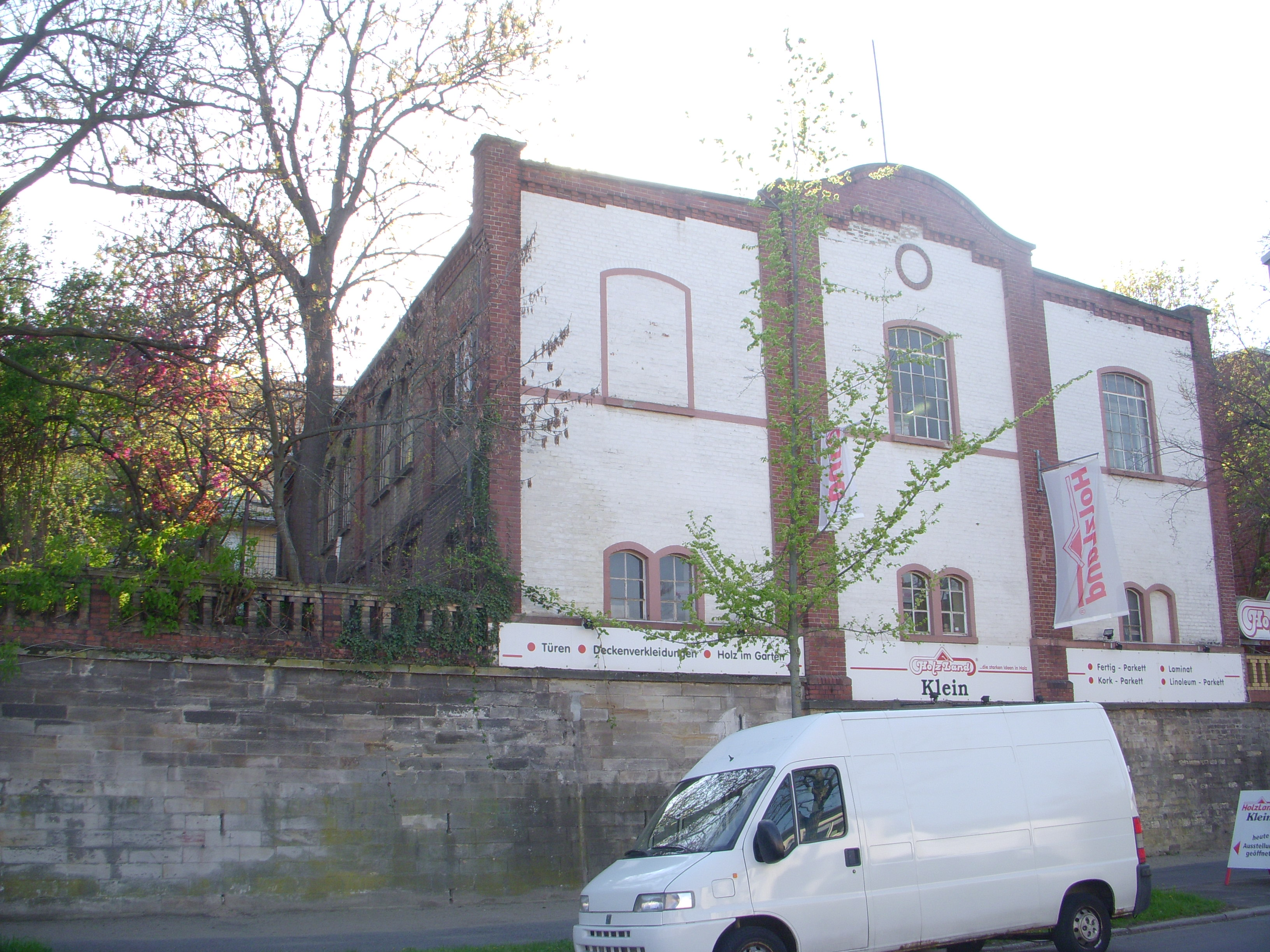 Armeekonservenfabrik Mainz, Mombacher Straße